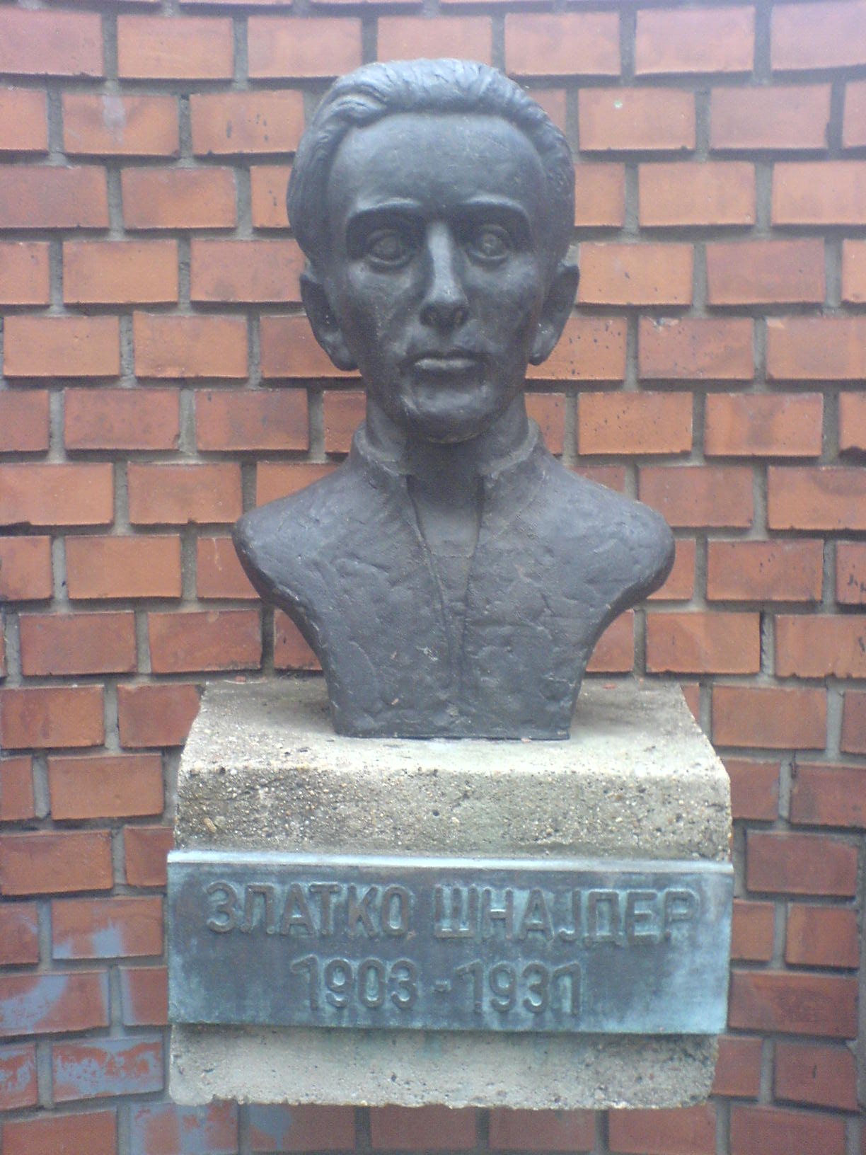 Биста Златка Шнајдера (1903-1931), једног од седморице секретара СКОЈ, у дворишту ОШ „Седам секретара СКОЈ-а“ на Новом Београду.